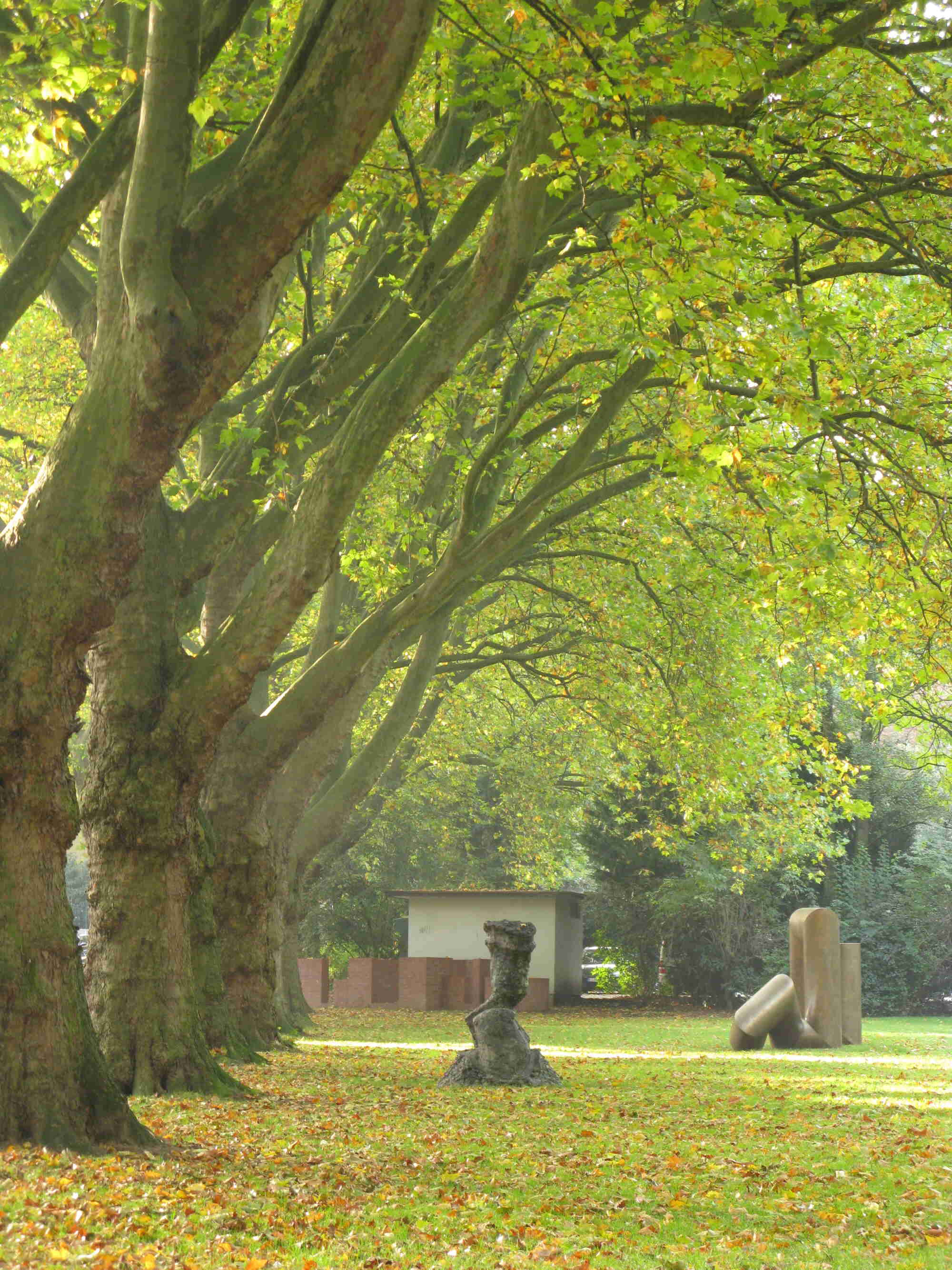 Moltkeplatz Essen: Skulpturen von Heinz Breloh+Friedrich Gräsel+Hannes Forster unter 100 Jahre alten Platanen